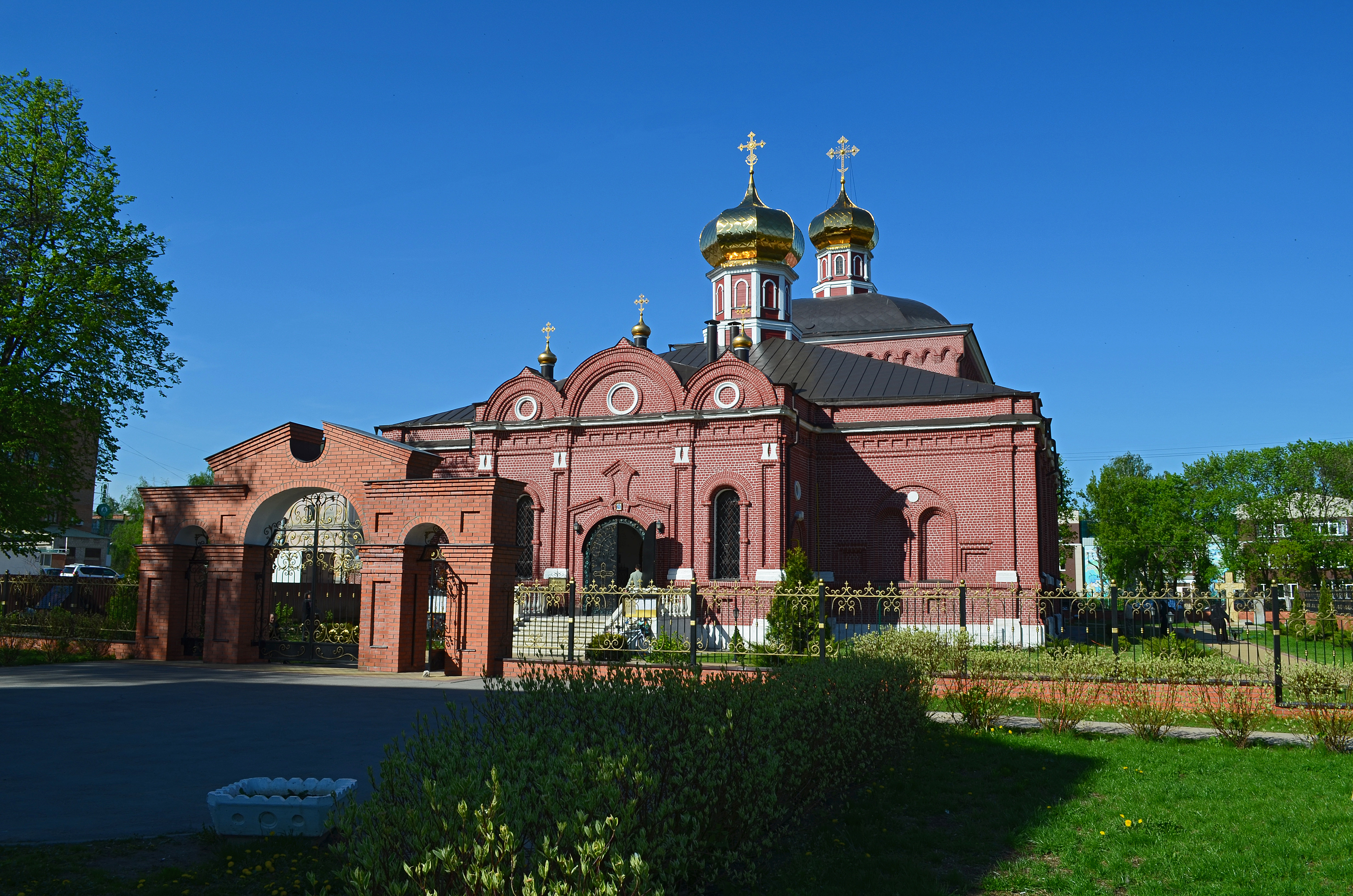 Монастырь Казанский (ансамбль Казанского монастыря): улица Затинная, Фурманова, Рязань, Рязанская область